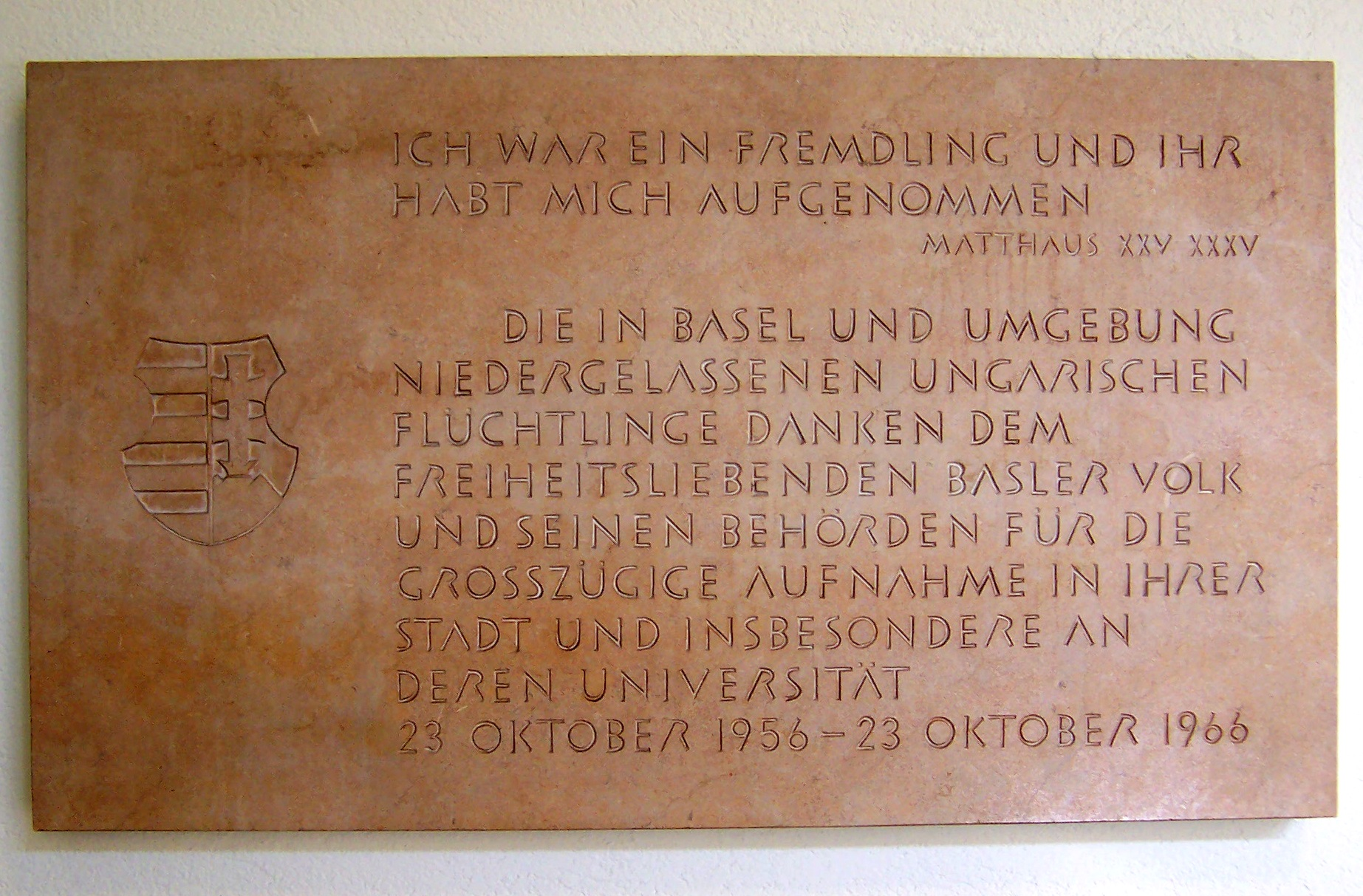 Gedenktafel der ungarischen Flüchtlingen an der Universität Basel, die 1966 anlässlich des 10. Jahrestages der Ungarischen Revolution von 1956 eingeweiht wurde.